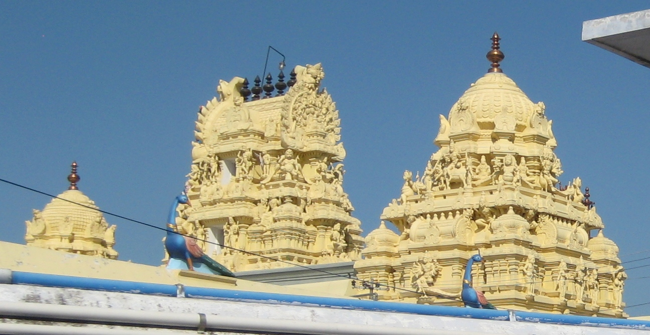 Kumarakottam Temple towers